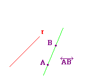 Representação de uma reta, feito por Guilherme Augusto de M. e S. Teixeira Representation of straight line, made by Guilherme Augusto de M. e S. Teixeira